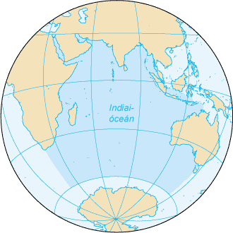 Az Indiai-óceán térképe, magyar földrajzi nevekkel